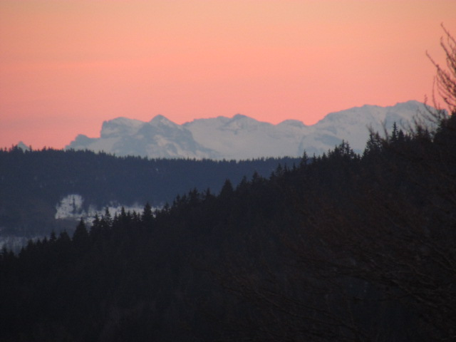 Die Schweizer Alpen vom Schauinsland, ca. 130 km